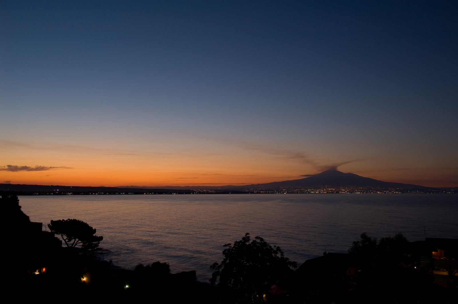 Foto panoramica del Golfo di Catania con sullo sfondo il Monte Etna